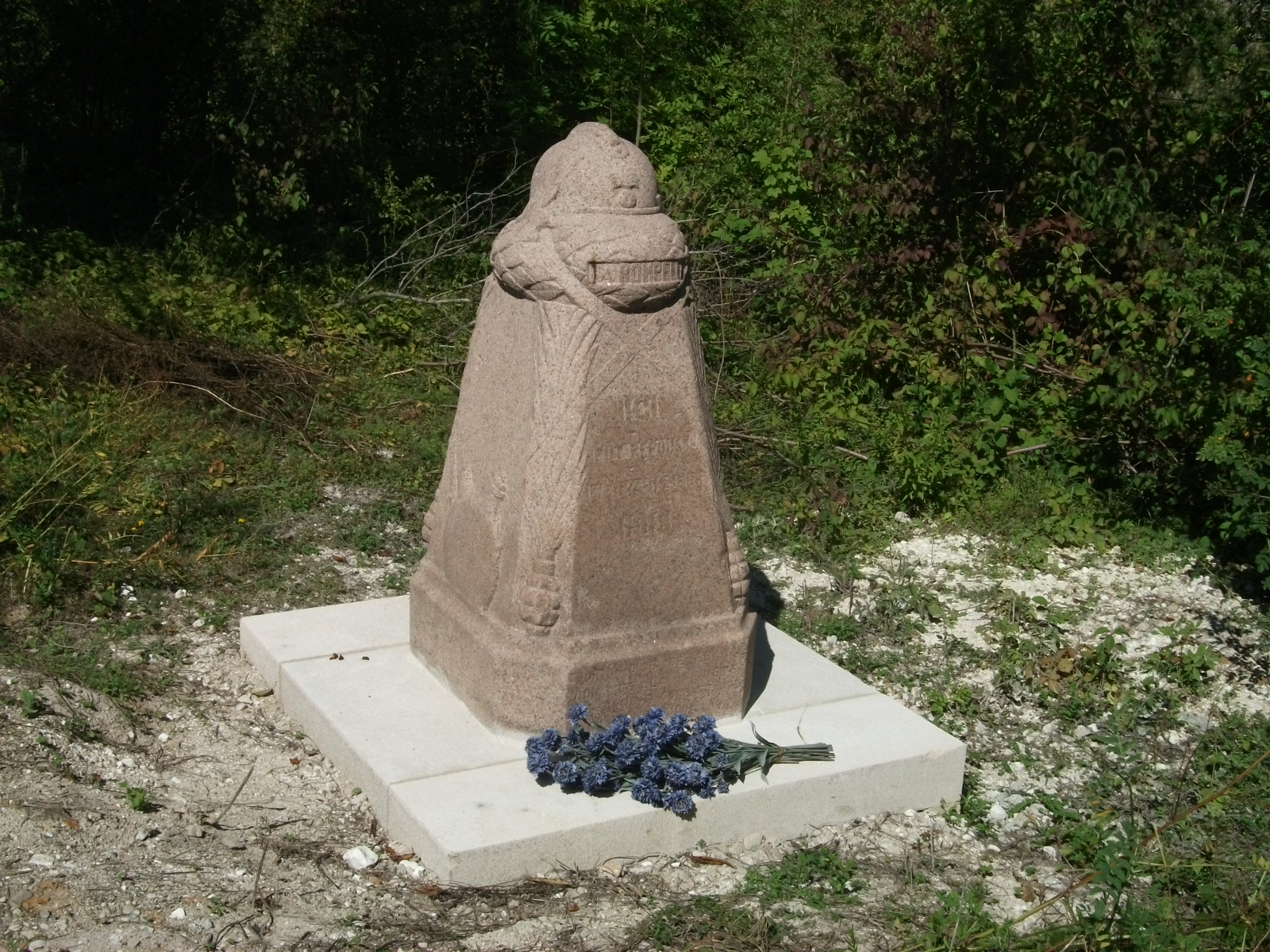 Borne kilometrique, dans le style Voie Sacrée, du fort de la Pompelle.